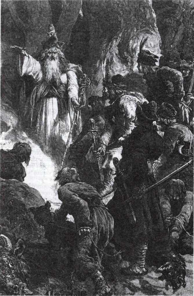 Беларуская (тарашкевіца): Вяшчун Лізьдзейка тлумачыць сон вялікага князя Гедзіміна (Giedzimin)